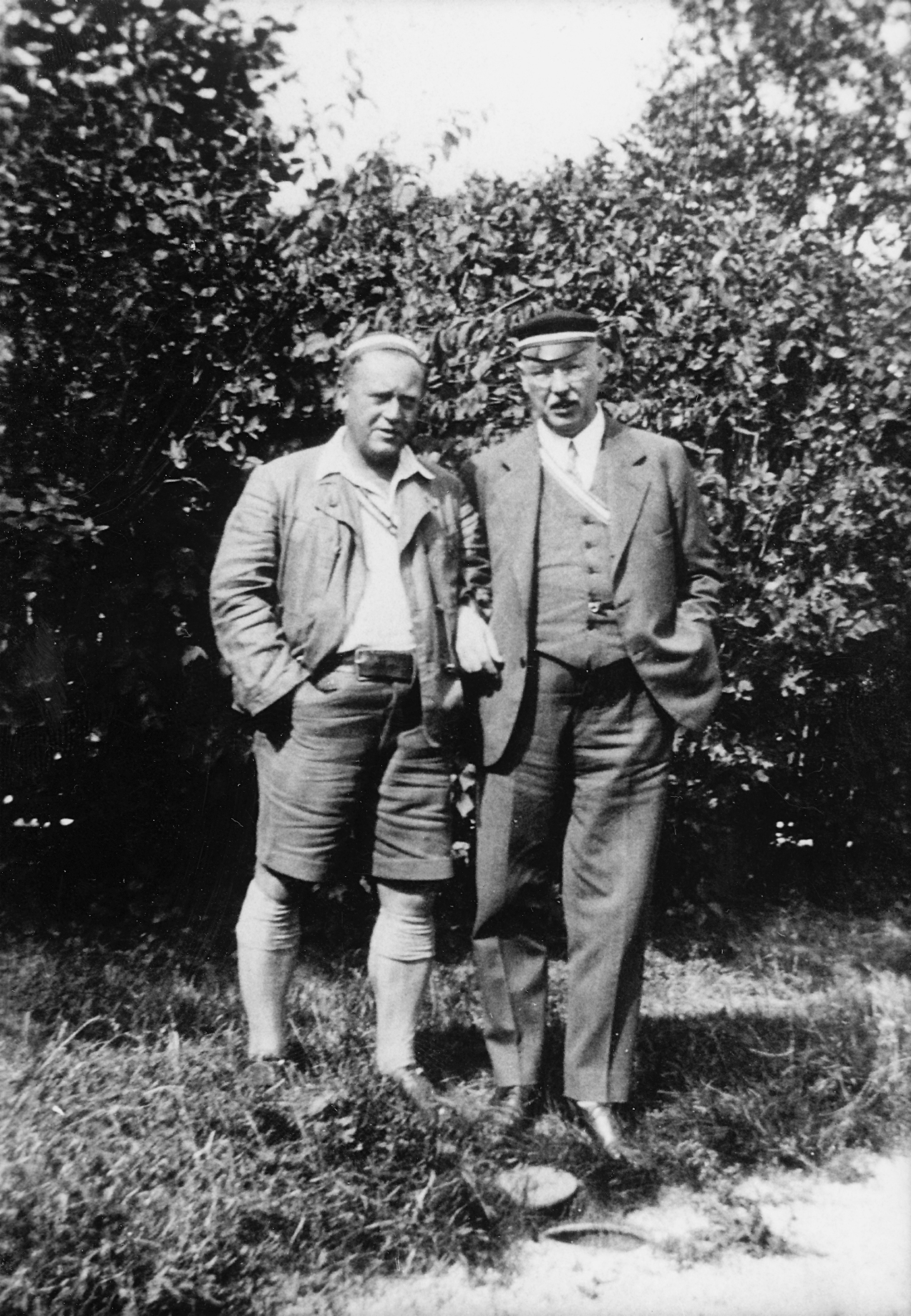 links: Karl Hans Strobl (1877-1946) und rechts: Franz Xaver Zimmermann (1876-1959)